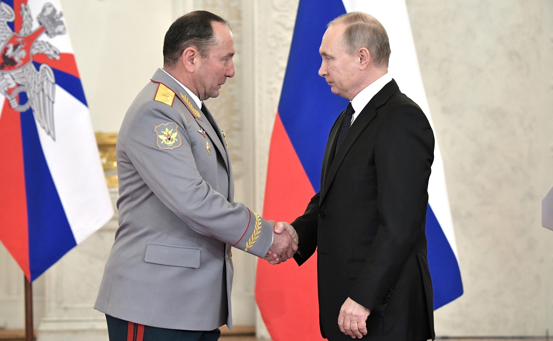 Встреча Президента России Владимира Путина с военнослужащими, участвовавшими в антитеррористической операции в Сирии. Генерал-майору Геннадию Жидко присвоено звание Героя Российской Федерации